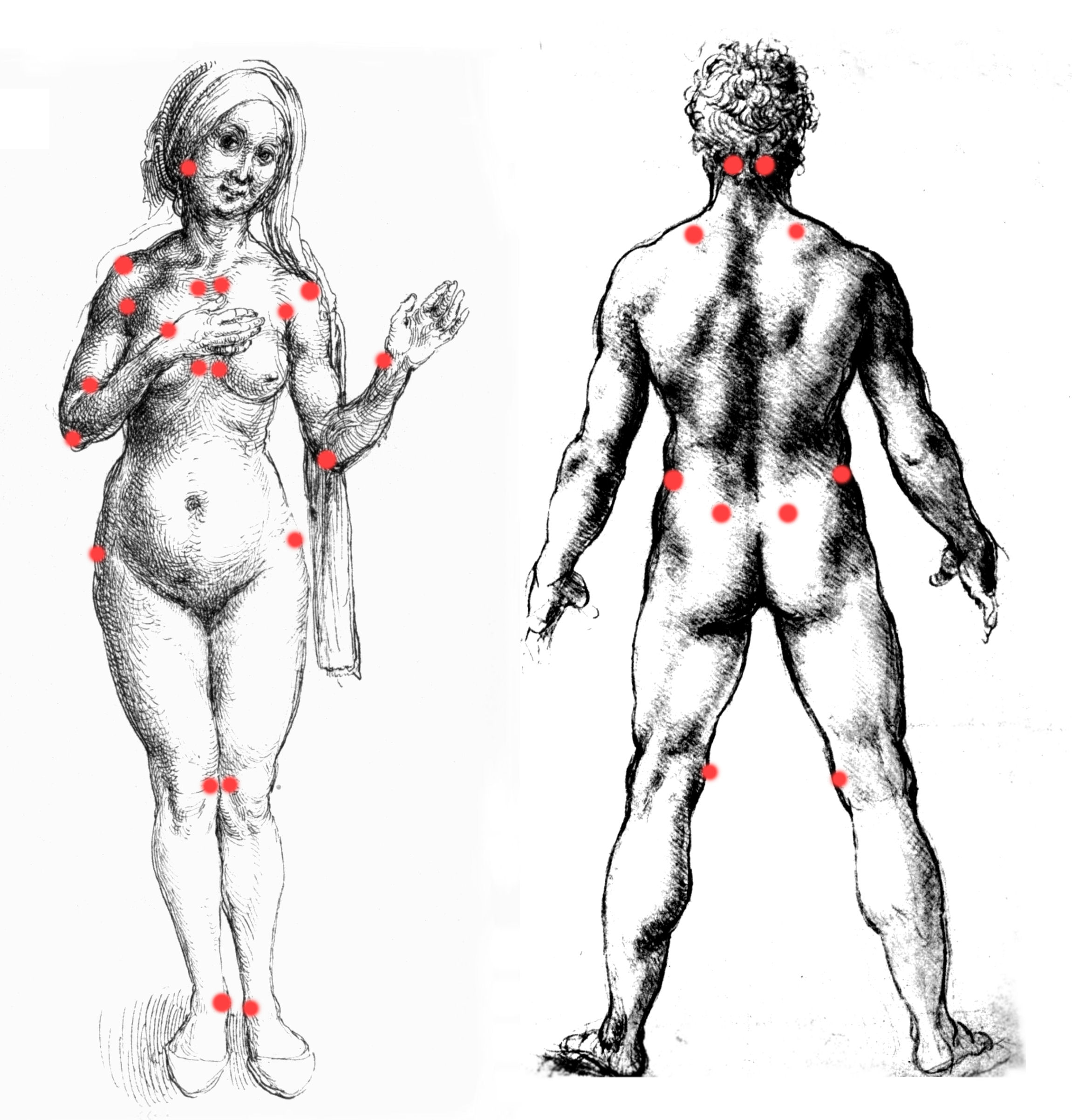 Fibromyalgie Tender Points (Druckpunkte) mit Albrecht Dürers Badefrau von 1493 und Leonardo da Vincis männlichem Akt von 1503.